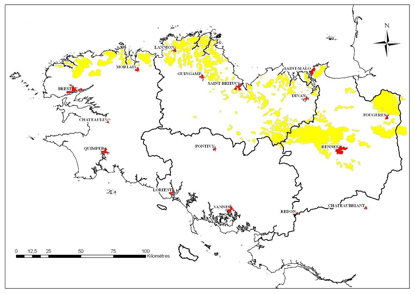 Cette carte donne l'extension approximative des limons éoliens en Bretagne. La carte est établie à partir de l'analyse granulométrique des horizons de surface des sols (d'après Walter, 1990)